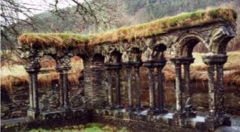 Lysekloster, Hordaland, Norway